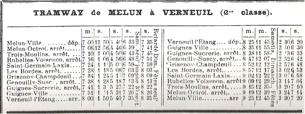 Fiche horaire du tramway de Verneuil en 1913